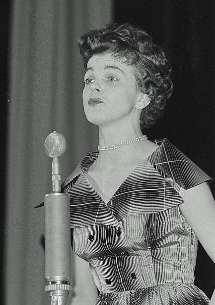 Original image description from the Deutsche Fotothek Brigitte Rabald bei der Festivität zum 60jährigen Bestehen der Leipziger Volkszeitung